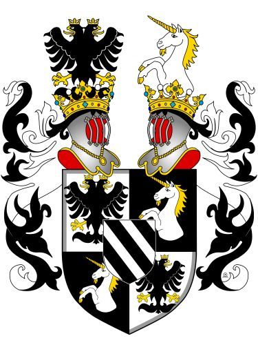 Znak rodu Cavriani